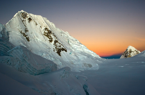 Foto tomada desde el campo alto del nevado Alpamayo, Cordillera Blanca, Áncash - Perú.